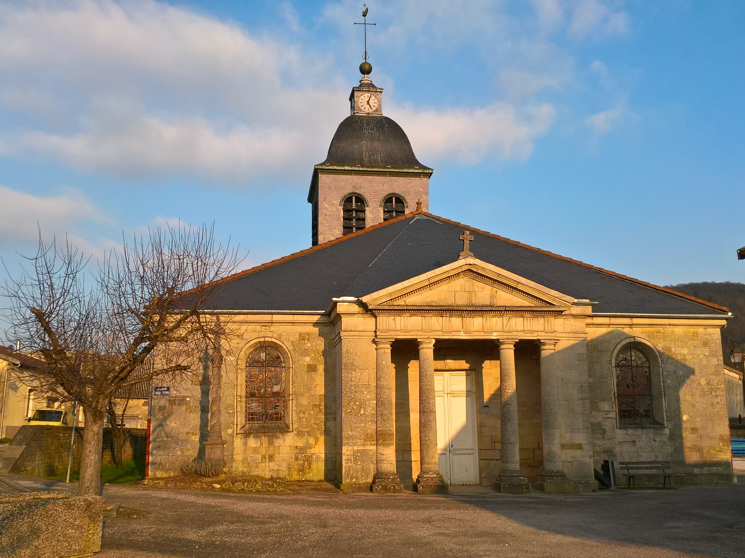 Thonnance-lès-Joinville, église Saint-Didier.